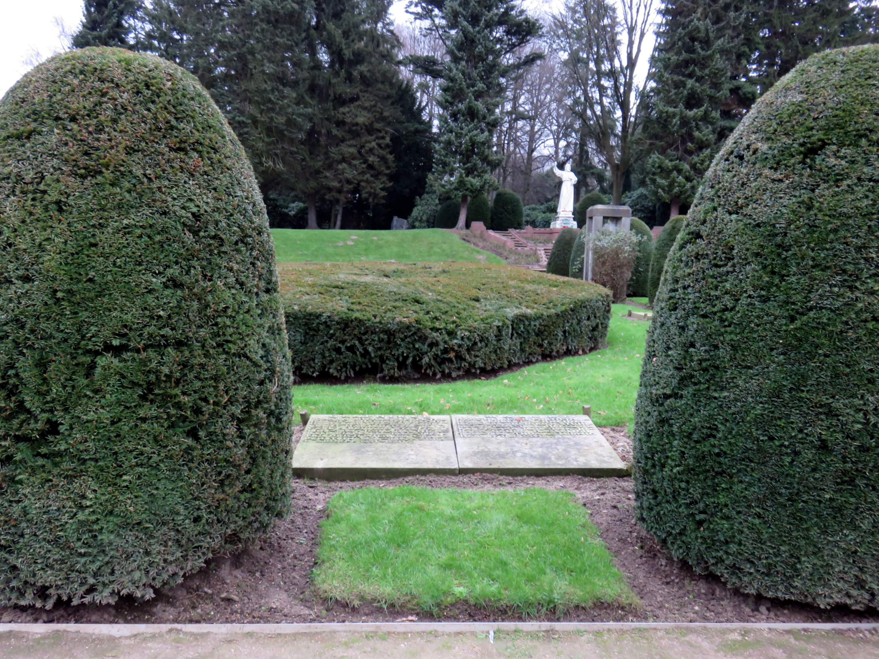 Lage des Doppel-Sammelgrabmals Graphiker (+ Maler) im Bereich des Althamburgischen Gedächtnisfriedhofs auf dem Hamburger Friedhof Ohlsdorf zu Ehren von u. a. Johannes Michael Speckter, Heinrich Joachim Herterich, Johann Theobald Riefesell, Ebba Tesdorpf, Friedrich Wilhelm Graupenstein, Heinrich Stuhlmann, Carl Ferdinand Stelzner, Robert Schneider, Hermann Kauffmann, Georg Haeselich und Thomas Herbst.